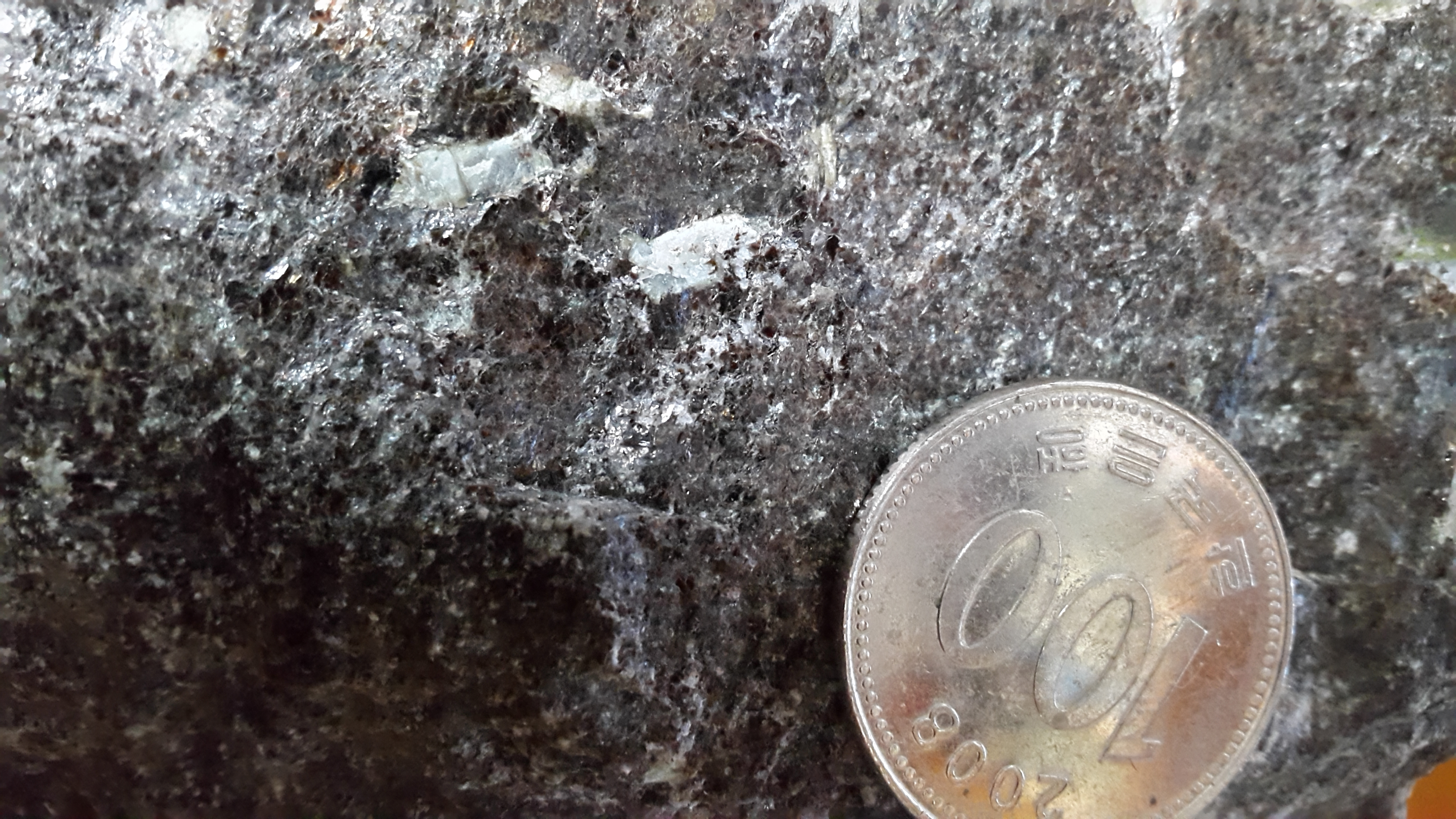 연천군의 운모편암에 나오고 있는 남정석. 도변상의 하늘색 결정으로 성장하였다.